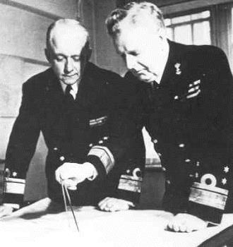 Vadm Jan Willem Termijtelen (1893-1977), Londen, Lt admiraal Furstner (rechts) en Vadm Termijtelen o.a. chef marinestaf 1941-1947 en cdt der marine in Groot-Brittannië 1941-1945; in 1947 uit dienst